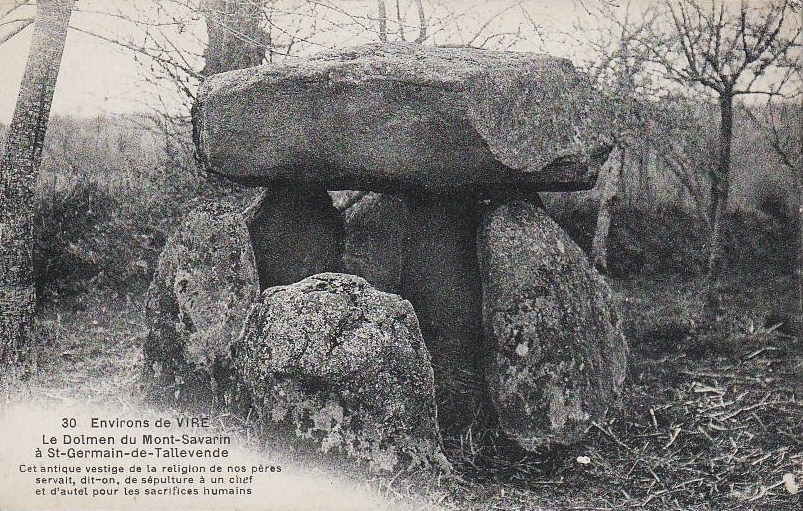 Carte postale ancienne du Dolmen de la Loge aux Sarrazins à Saint-Germain-de-Tallevende-la-Lande-Vaumont (Calvados)